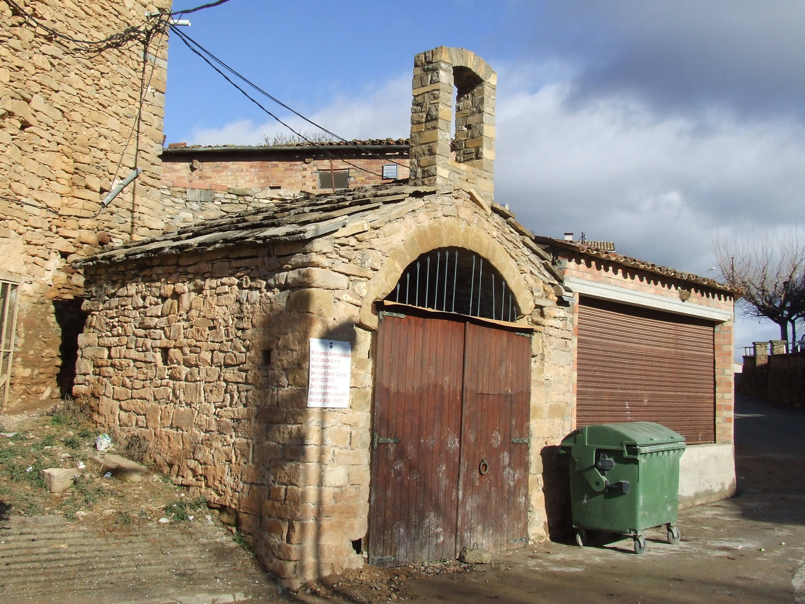 Capella de la Mare de Déu de la Pietat (Palau de Noguera, Tremp, Pallars Jussà)